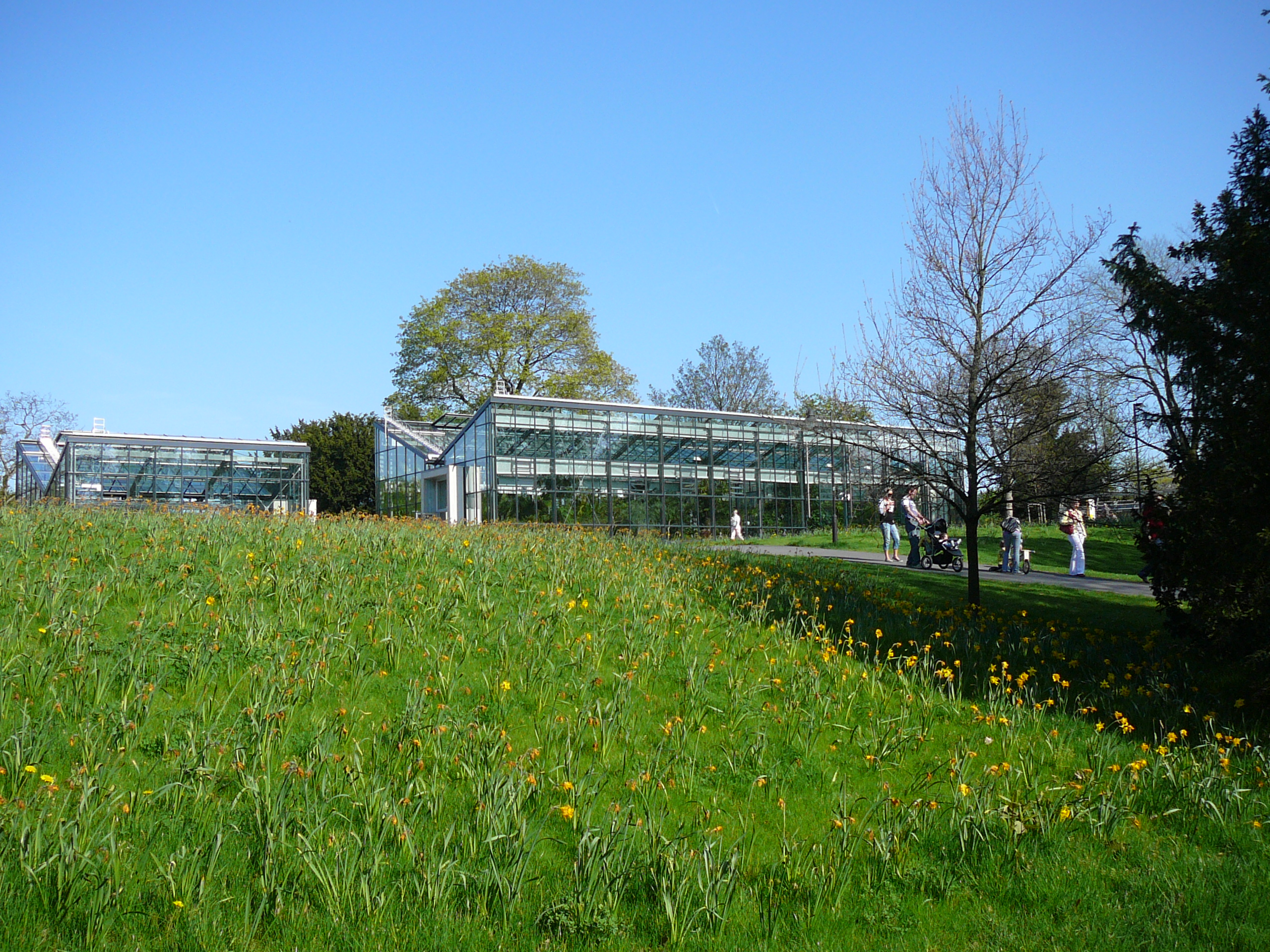 Hardt-Anlagen, Wuppertal